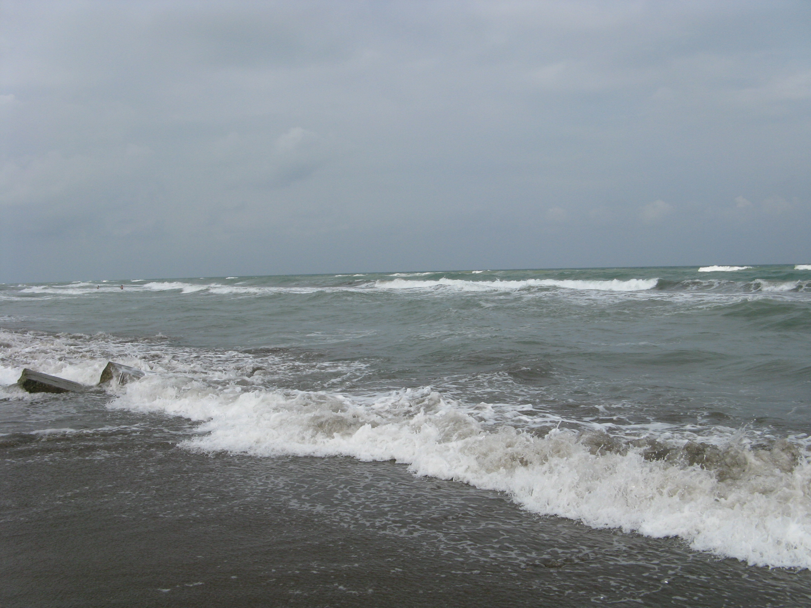 دریای خزر